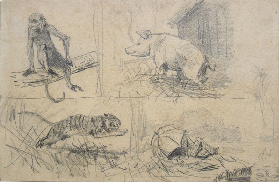 Estudo (Zoológico), grafite